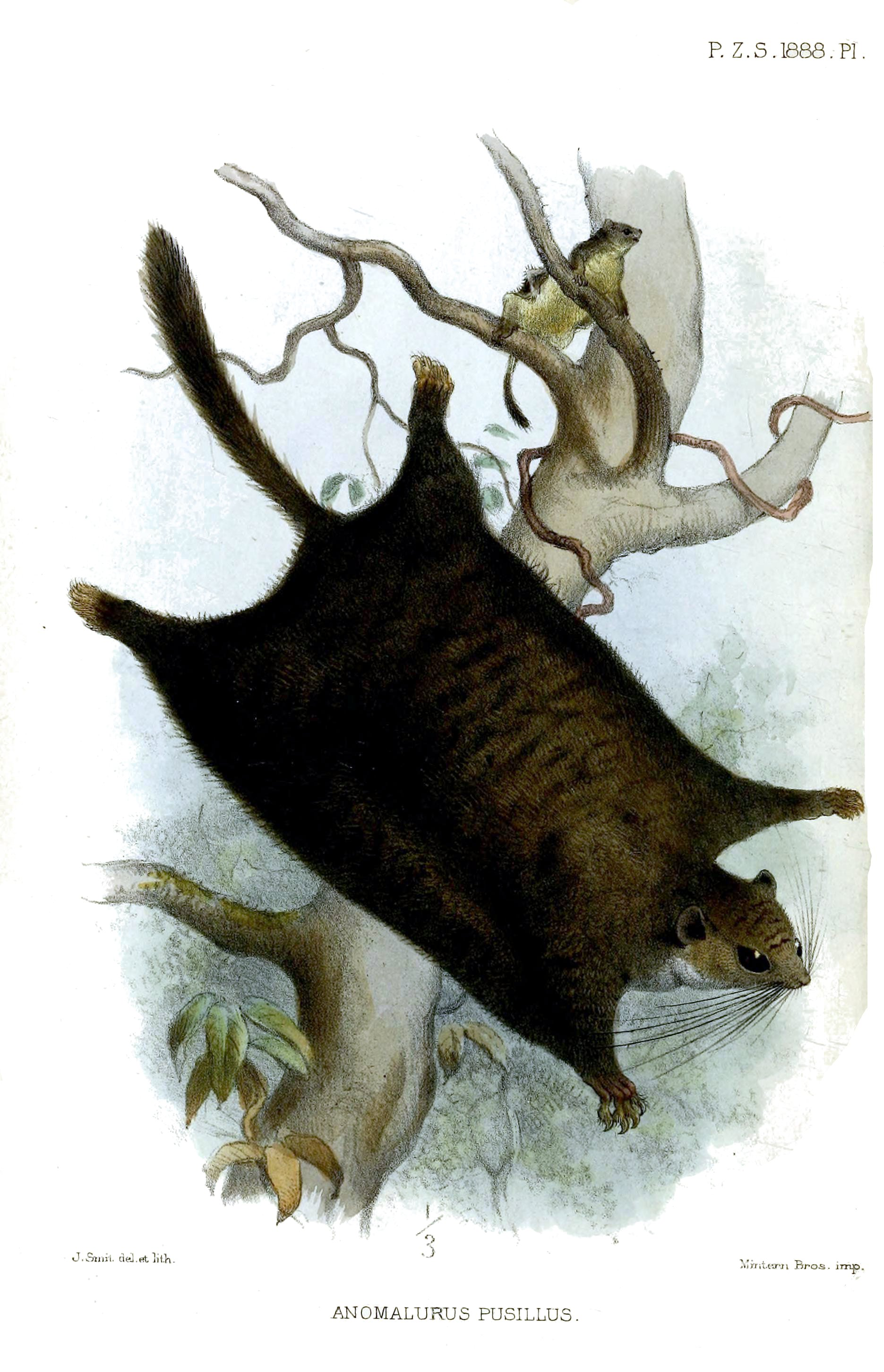 Anomalurus pusillus